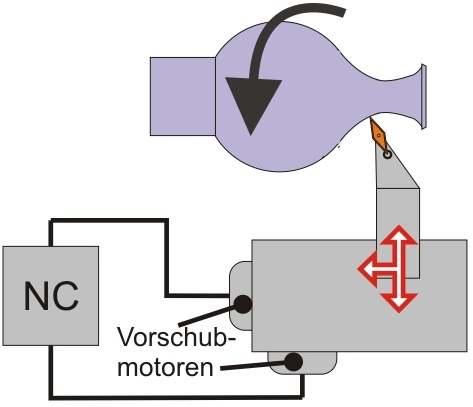 NC Formdrehen